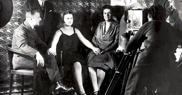 Zoe Gräfin Wassilko von Serecki mit Eleonore Zugun 1926